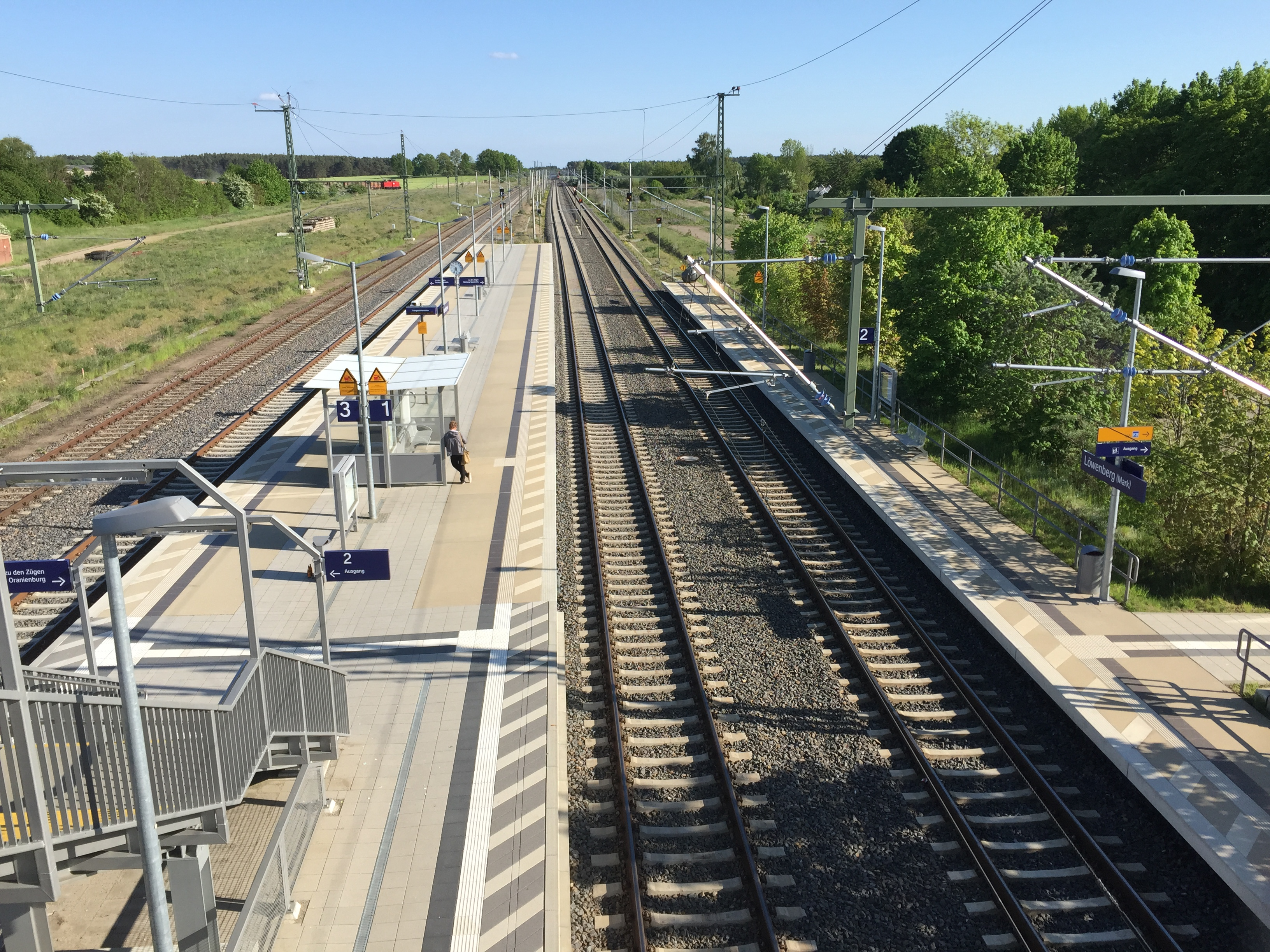 Gleisanlagen des Bahnhof Löwenberg (Mark)